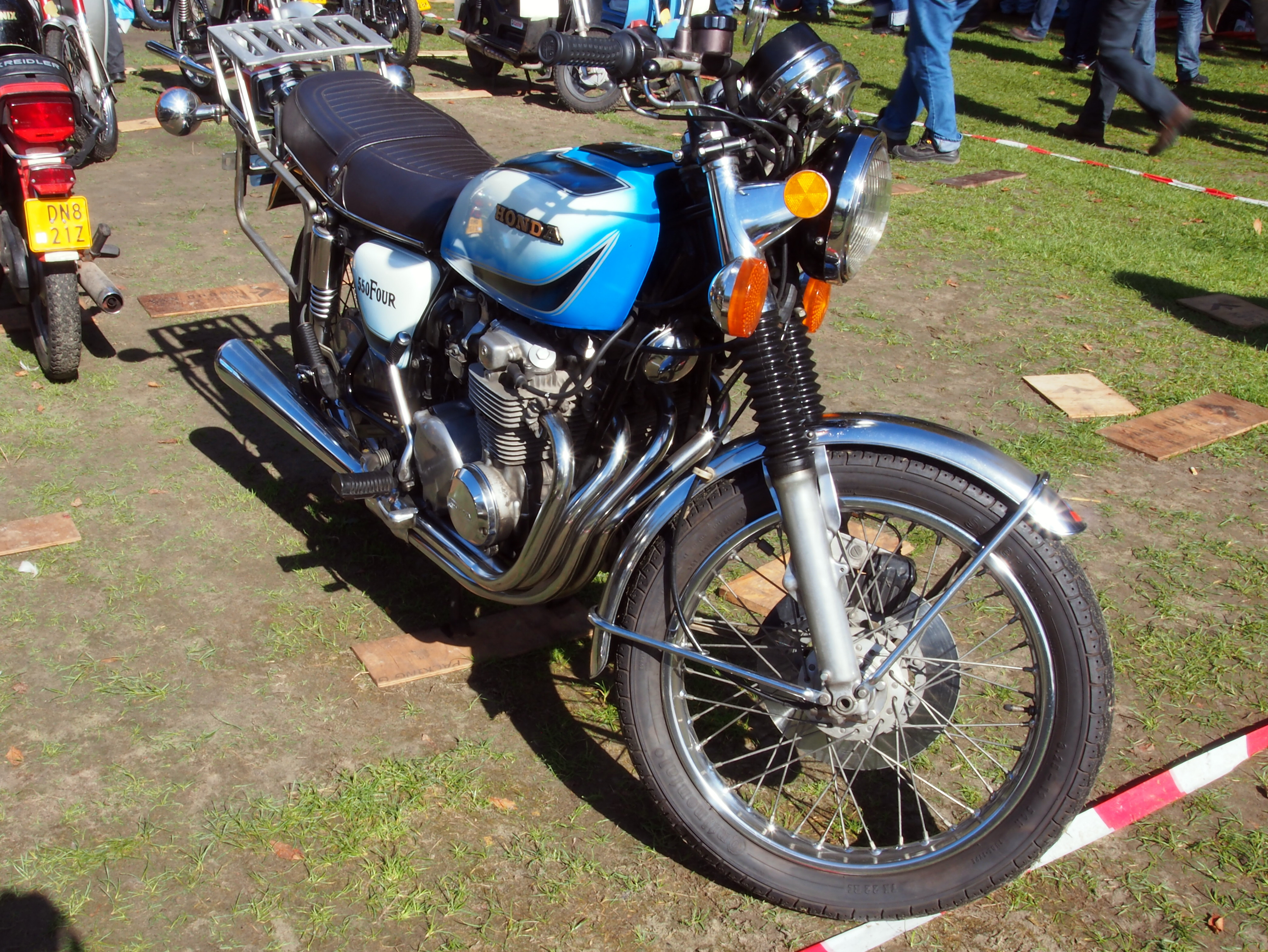 Blue Honda 550Four.